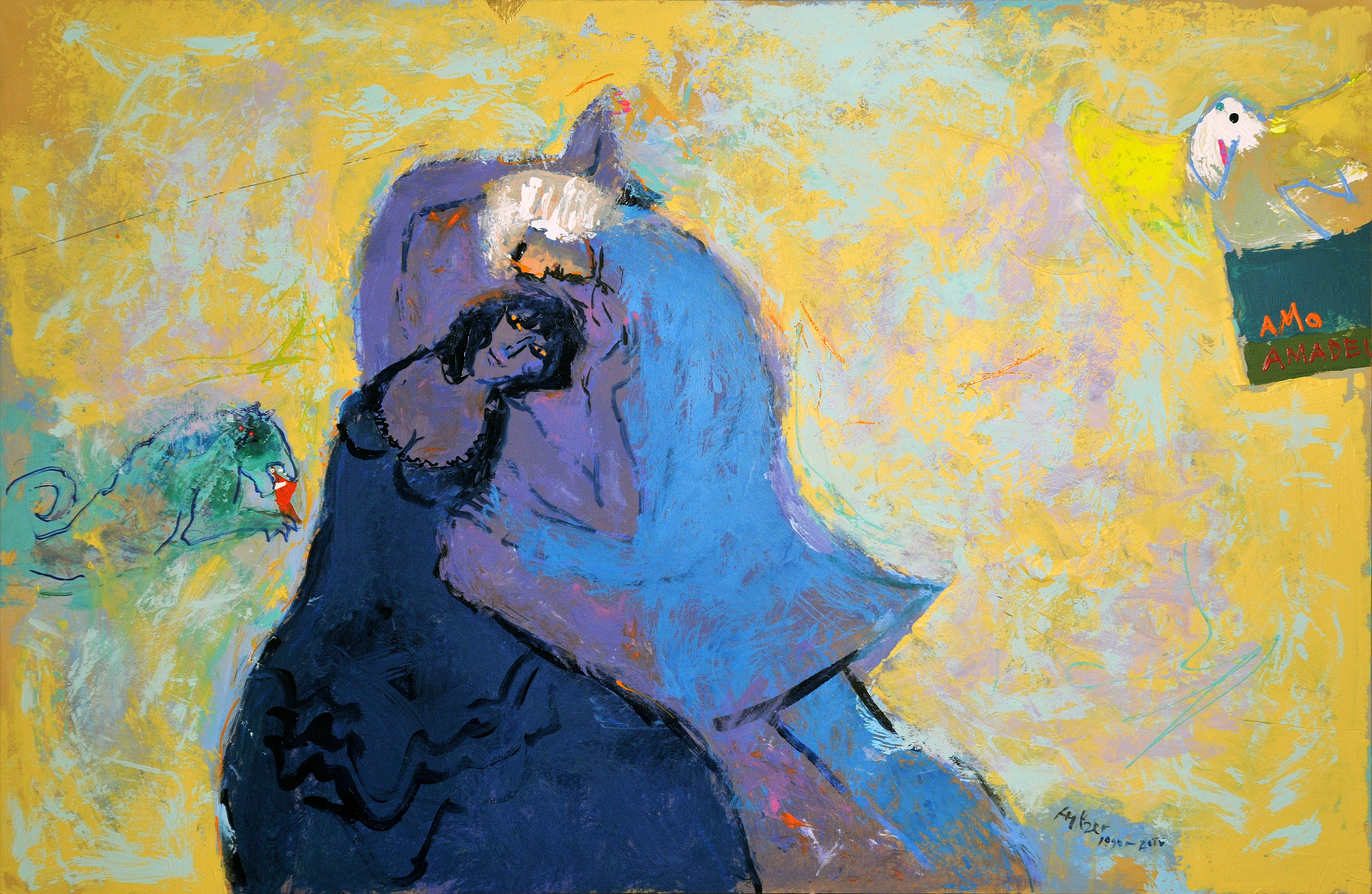 Dieses Bild von Adi Holzer trägt den Namen "Amore". Adi Holzer ist ein geborener Österreicher. Er schätzt deshalb Wolfgang Amadeus Mozart und hört während seiner Arbeit oft als Inspirationsquelle Musik von Wolfgang Amadeus Mozart. Viele seiner Werke widmet Adi Holzer dem von ihm geschätzten Wolfgang Amadeus Mozart. Auch dieses Werk trägt auf der Bildfläche in abgekürzter Form die Widmung AMo und AMADEU. Vorarbeiten 1996-2016, Fertigstellung 2016